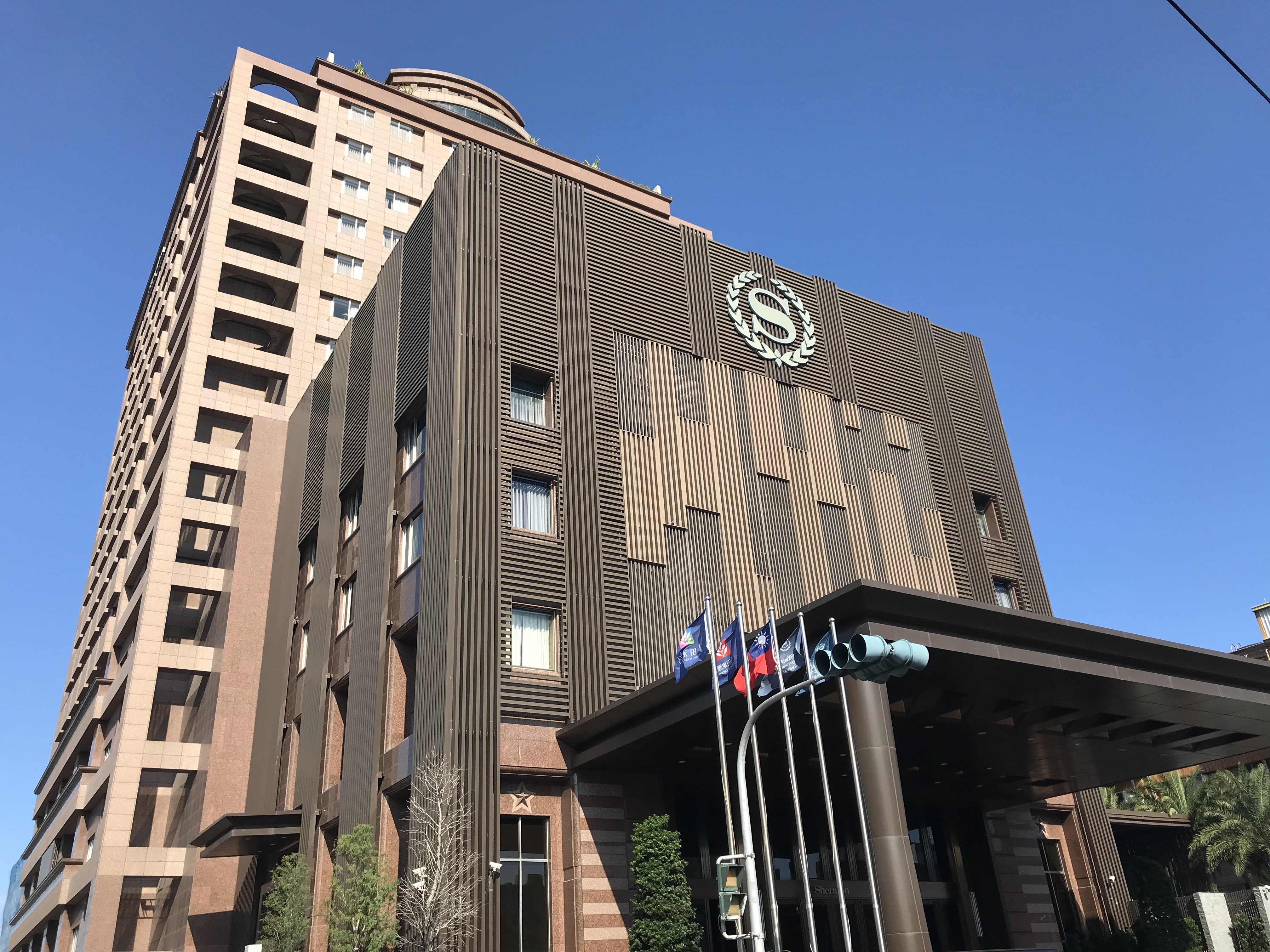 台東桂田喜來登酒店外觀